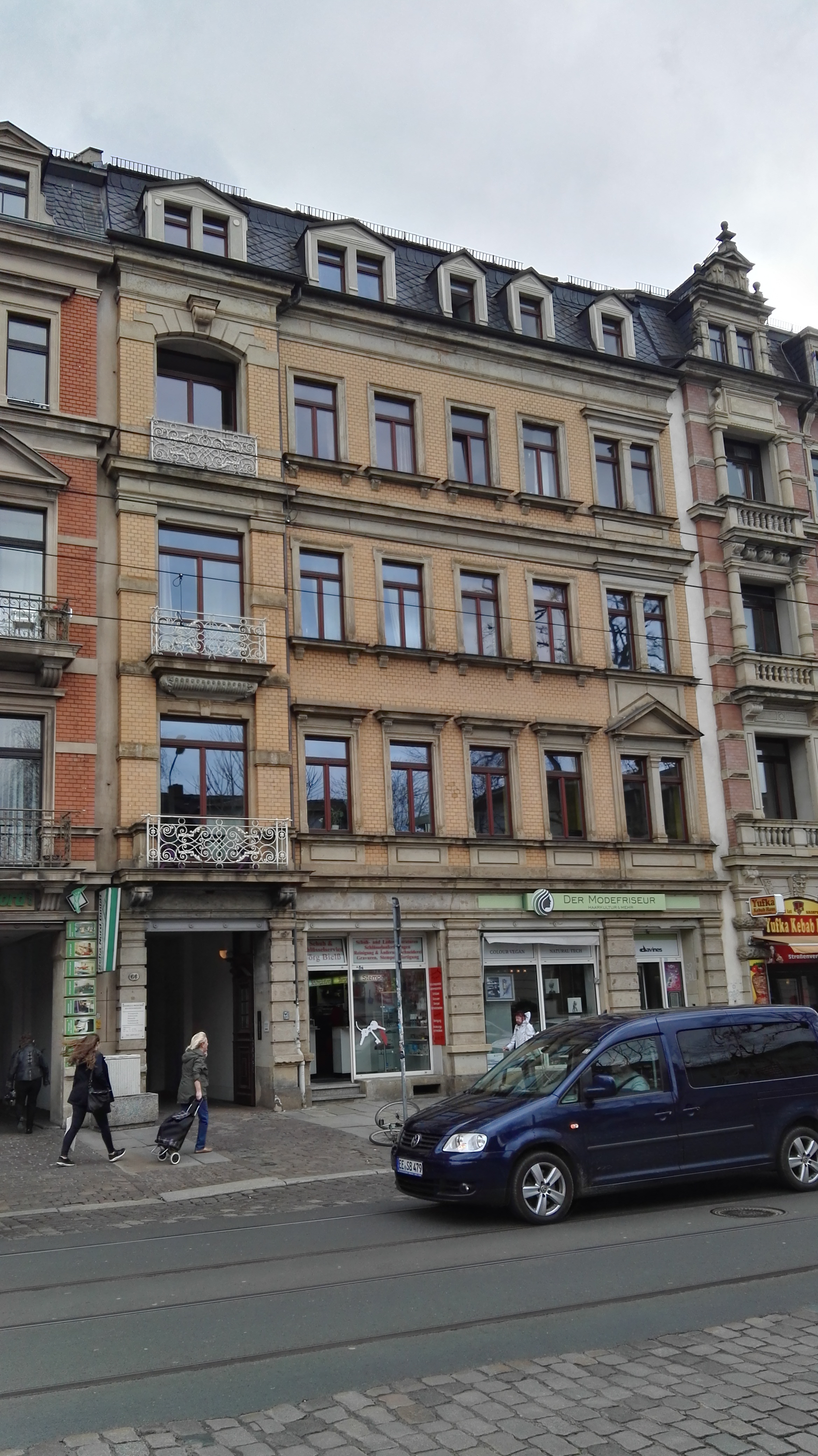 denkmalgeschütztes Wohn- und Geschäftshaus in der Königsbrücker Straße 66 in Dresden